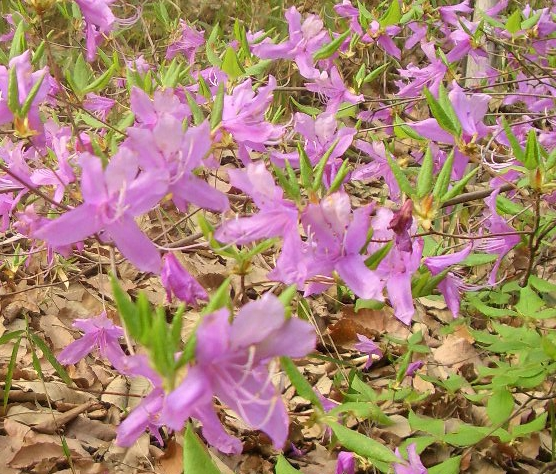 Rhododendron reticulatum at kisibejinnja.